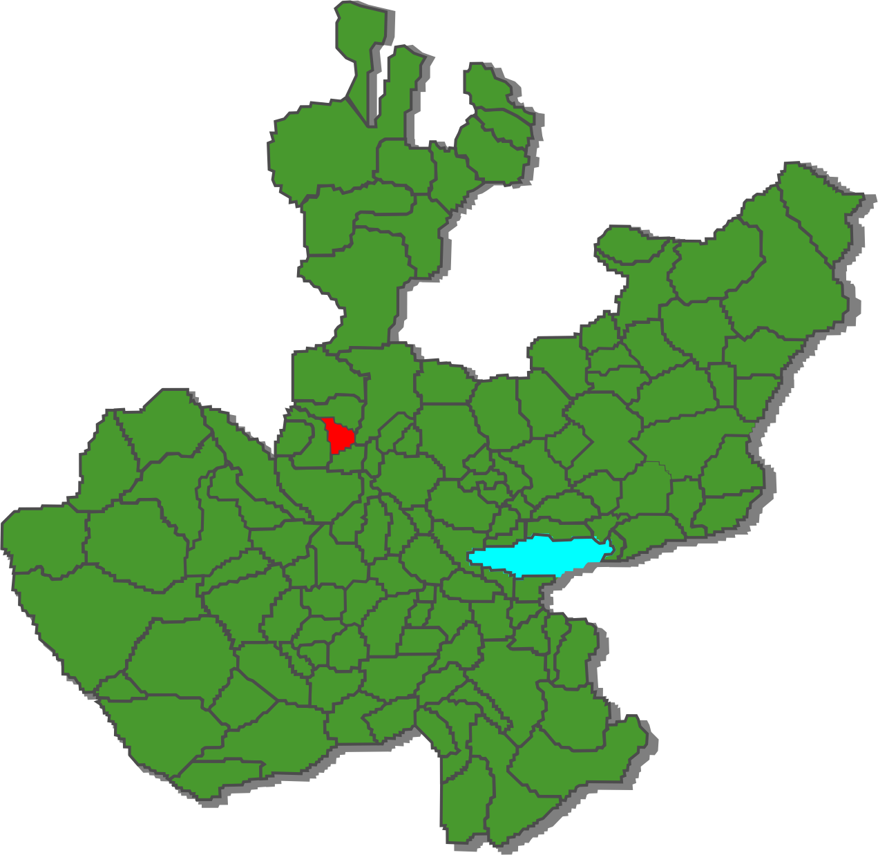 Mapa de ubicación del municipio "El Arenal" en Jalisco.